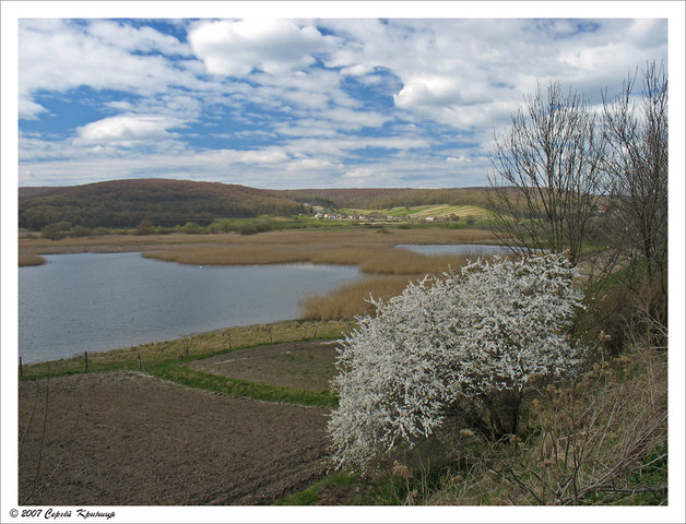 Урмань